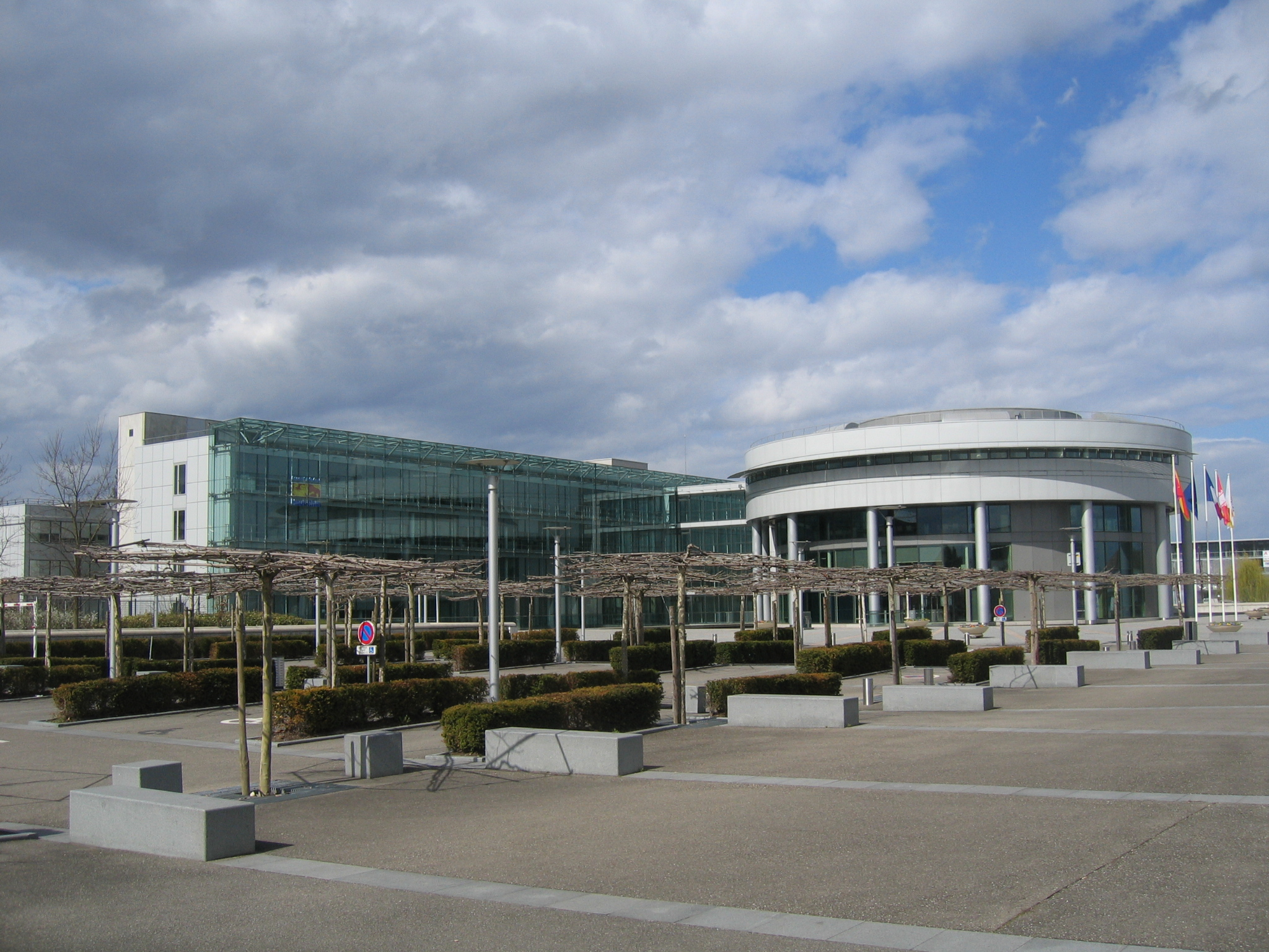 Le Conseil Général du Haut-Rhin